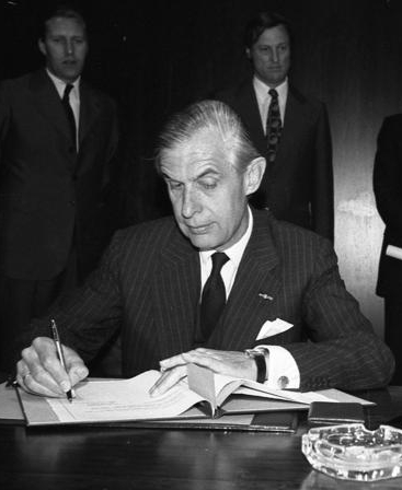 Title: Bonn, AA, Vertrag mit den Niederlanden Extra information: Rechts Botschafter van Lynden People in the image: Lynden, Diederic Wolter van: Botschafter in der Bundesrepublik Deutschland, Niederlande# * Gehlhoff, Walter Dr.: Ständiger Vertreter bei der UNO, Bundesrepublik Deutschland Factual corrections and alternative descriptions are encouraged separately from the original description. Additionally errors can be reported at this page to inform the Bundesarchiv. Original historic description: Unterzeichnung eines Abkommens über Zusammenlegung der Grenzabfertigung zwischen der Bundesrepublik Deutschland und den Niederlanden durch Staatssekretär Walter Gehlhoff und dem niederländischen Botschafter Diederic Wolter Baron van Lynden im Auswärtigen Amt.